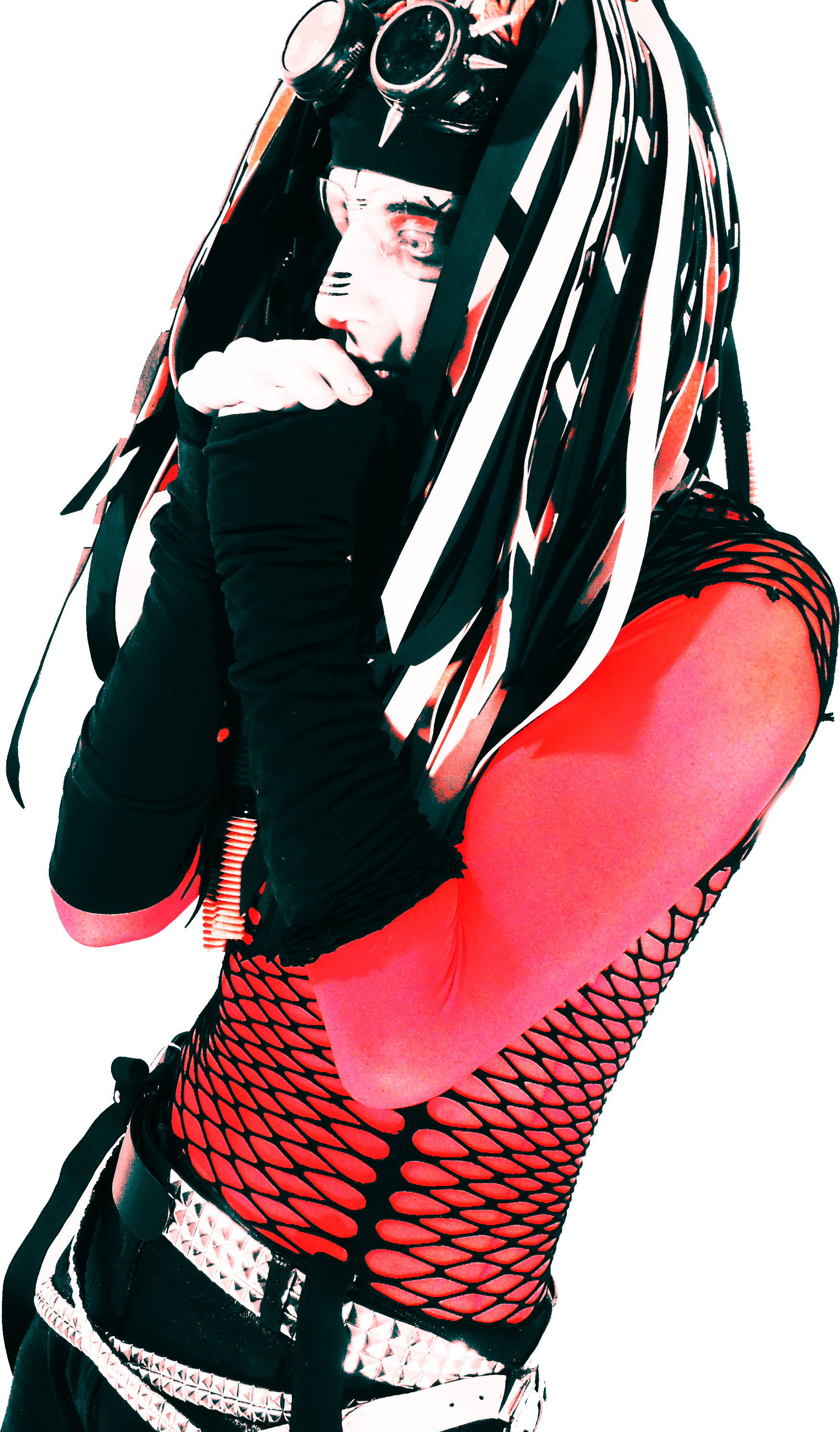 Modelo Cybergoth de Buenos Aires, Argentina. Alexander Crowley, administrador de DasKlub Argentina